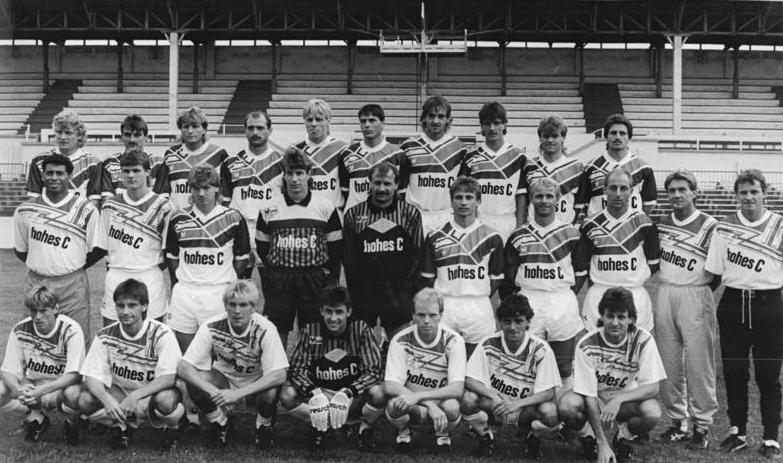 ADN-Wolfgang Kluge-18.8.90-Leipzig: Mannschaft des FC Sachsen Leipzig Trainer Jimmy Hartwig (2. Reihe links) mit seinem Aufgebot für die kommende Saison: Frank Baum, Jörn Dahms, Jörg Engelmann, Uwe Ferl, Jens Härtel, Frank Illge, Jörg Kirsten, Andreas Kösser, Dieter Kühn, Hans-Jörg Leitzke, Uwe Lüdtke, Dirk Majetschak, Nico Niedziella, Dirk Pfitzner, Hein Binder, Mario Röhrborn, Hubert Suchontke, Frank Turnier, Dirk Weitzke, Matthias Zimmerlin, Rene Müller und die Co-Trainer Joachim Steffens und Joachim Fritsche.